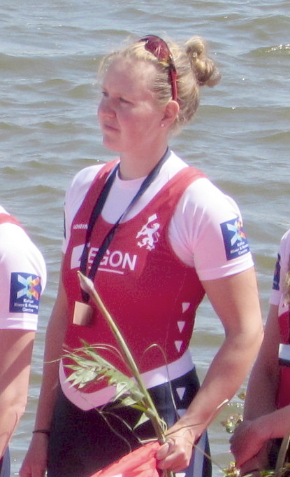 Jose van Veen, Ruder-EM 2016